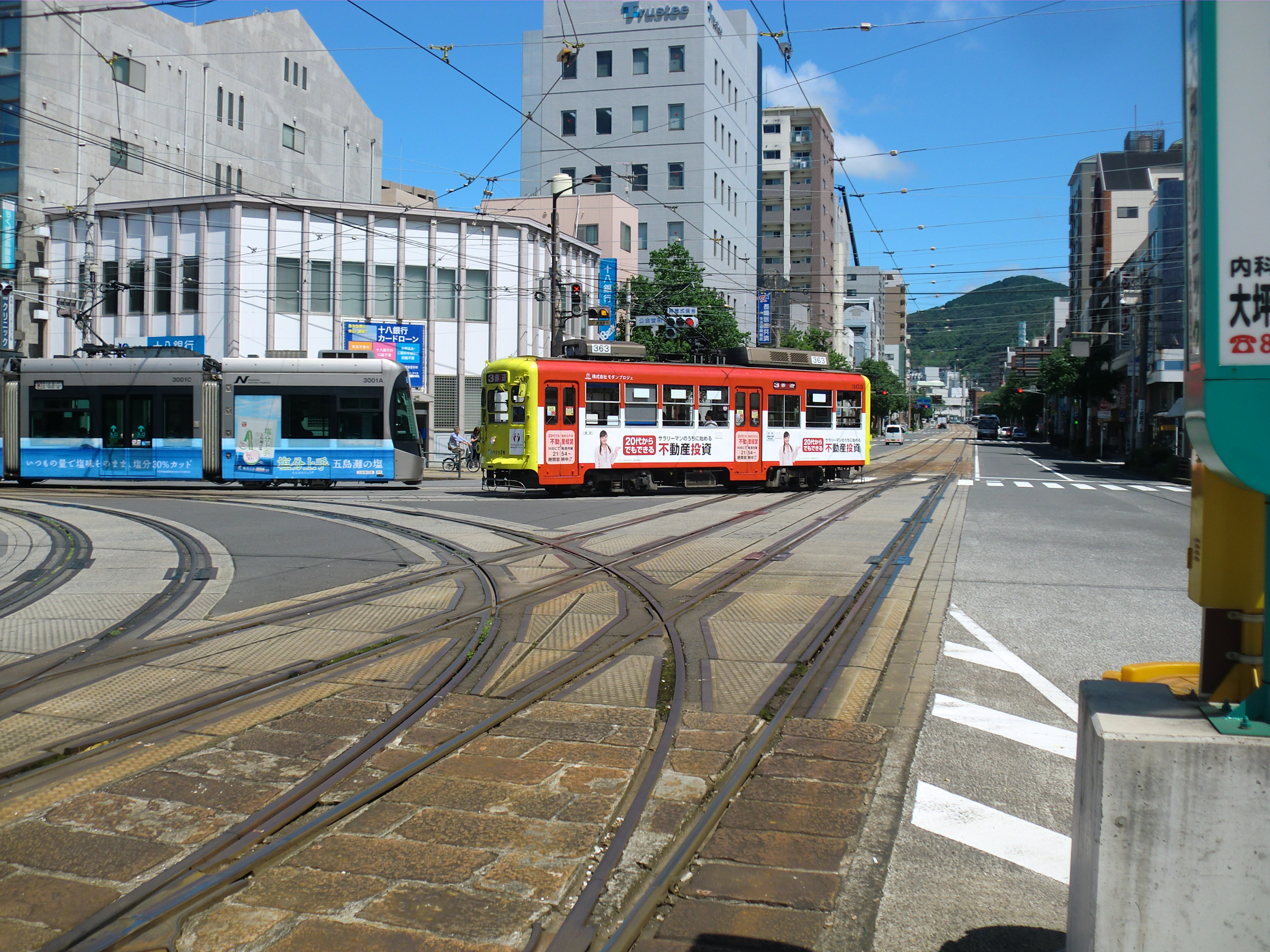 長崎市公会堂前交差点